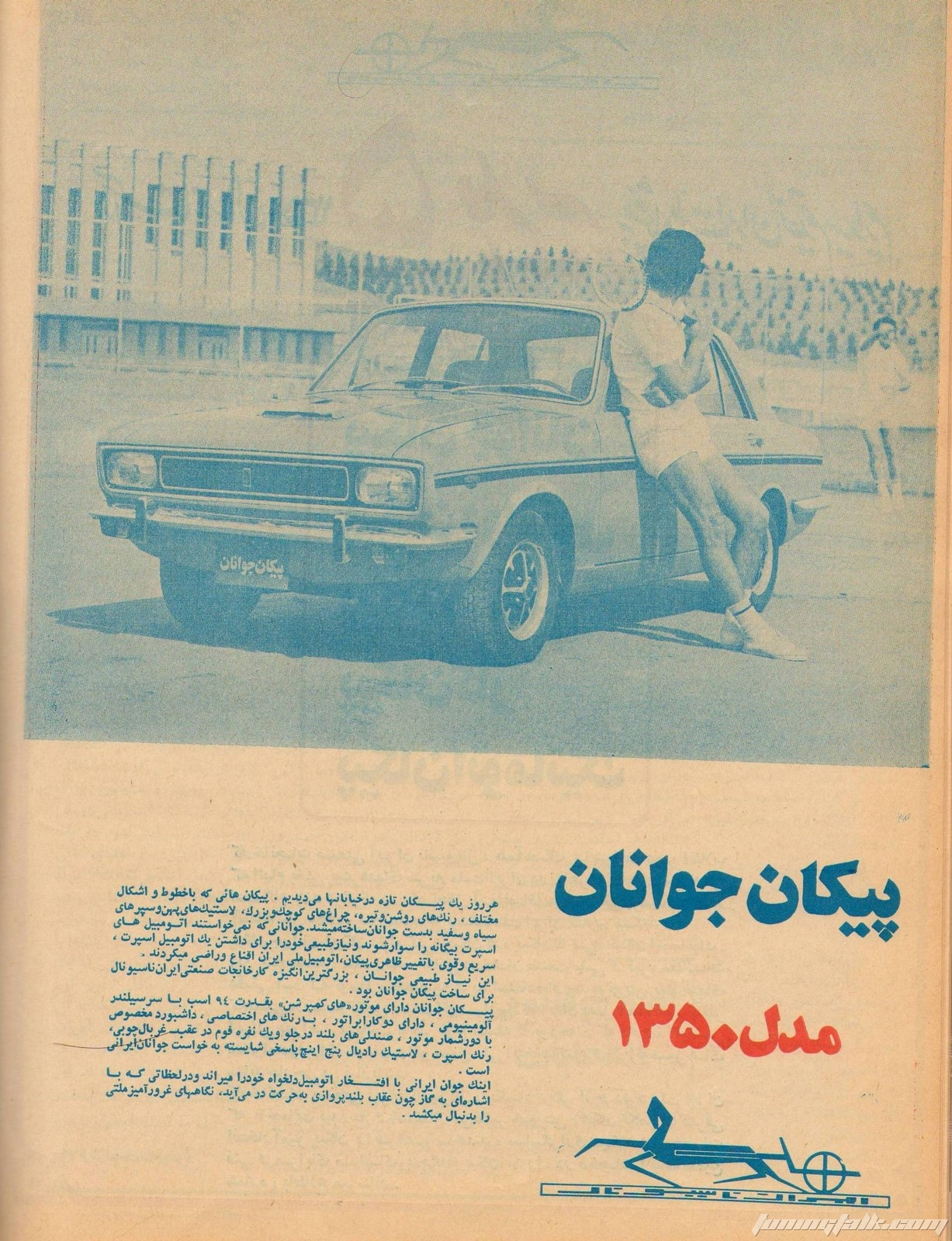 Car Magazine-Paykan Javanan Advertisements-1971 تبلیغ پیکان جوانان-مجله ماشین 1350